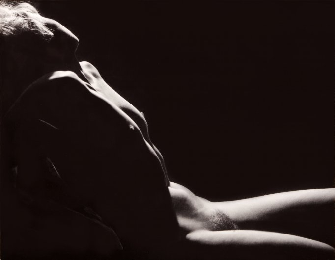 AnneMarie Heinrich: Portrait nu de l’actrice Tilda Thamar, 1949 (accusations de ‘l’exposition obscène’ à l’epoque)